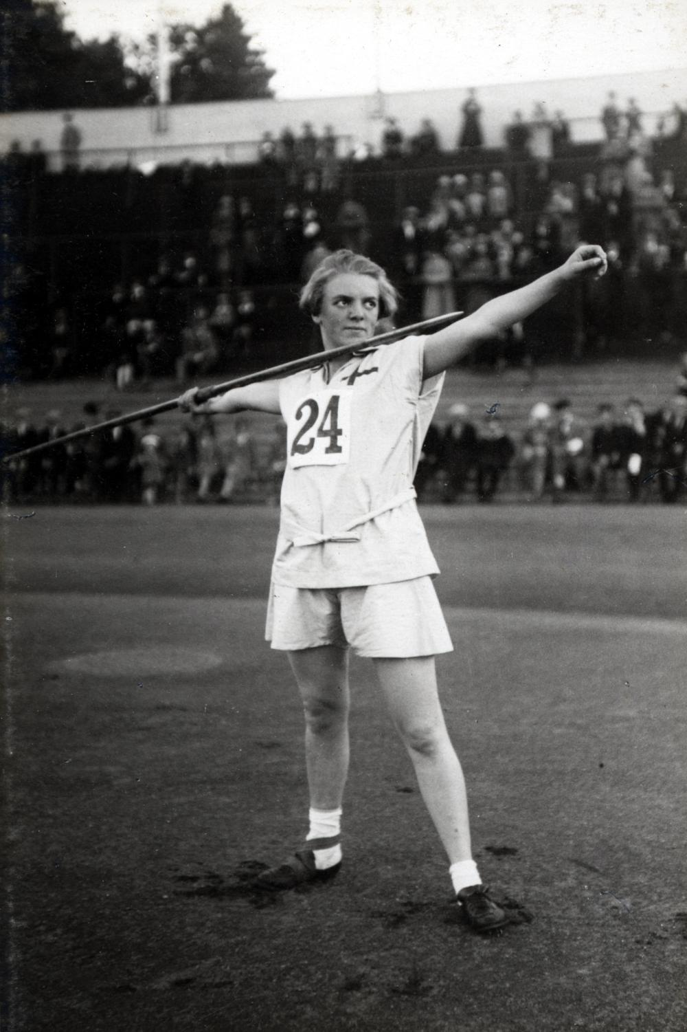 Anna-Lisa (eg. Anna Elisabeth Maria) Adelskiöld förbereder ett spjutkast vid Andra Internationella Kvinnliga Idrottsspelen i Göteborg 1926.